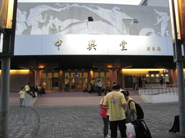 中文（台灣）: 台灣台中市中興堂